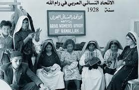 AWU of Ramallah